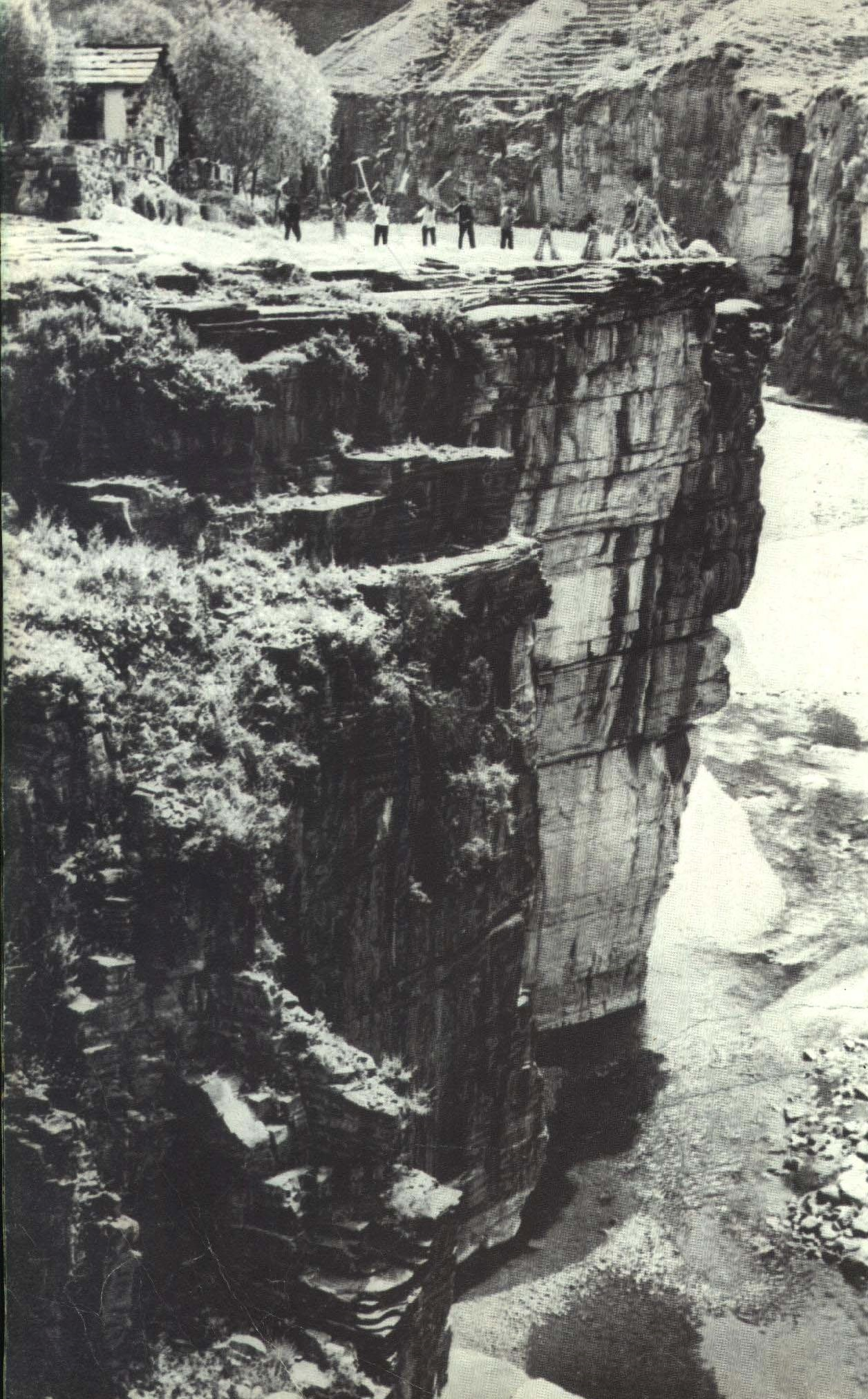 1964-07 1964年 太行山村